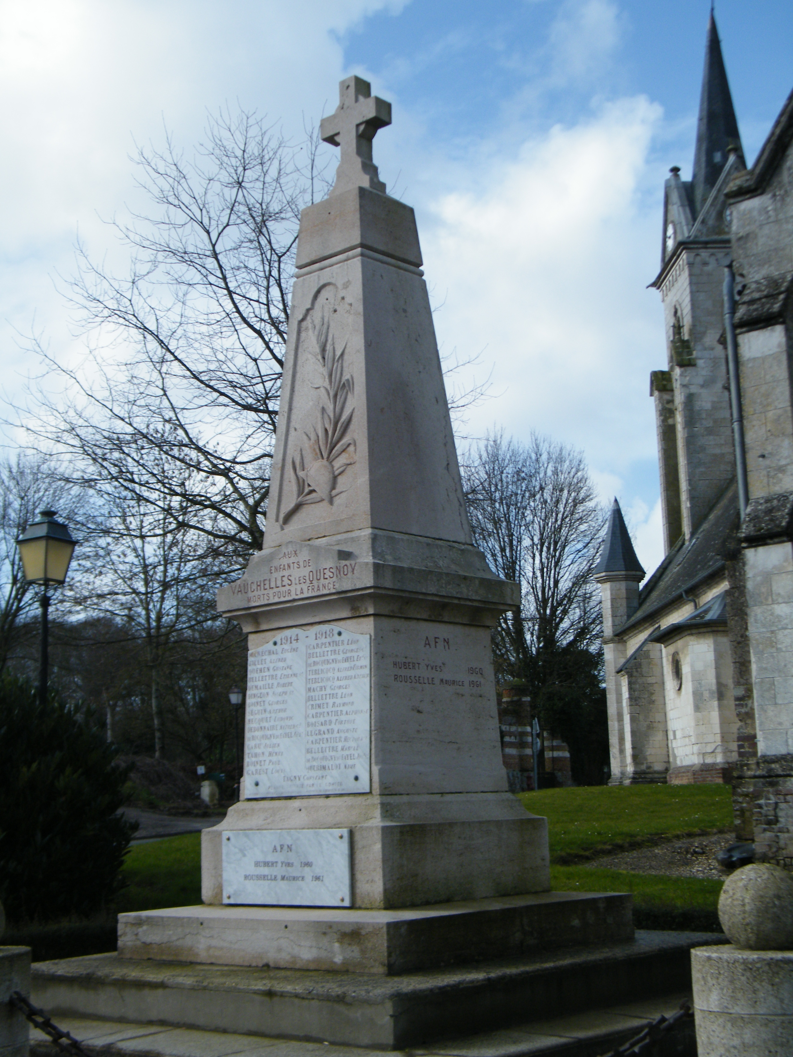 Vauchelles-lès-Quesnoy, Somme, Fr, le monument aux morts avec bas relief représentant un casque et une palme de laurier.